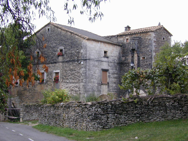 Fachada de Casa fortificada con matacán